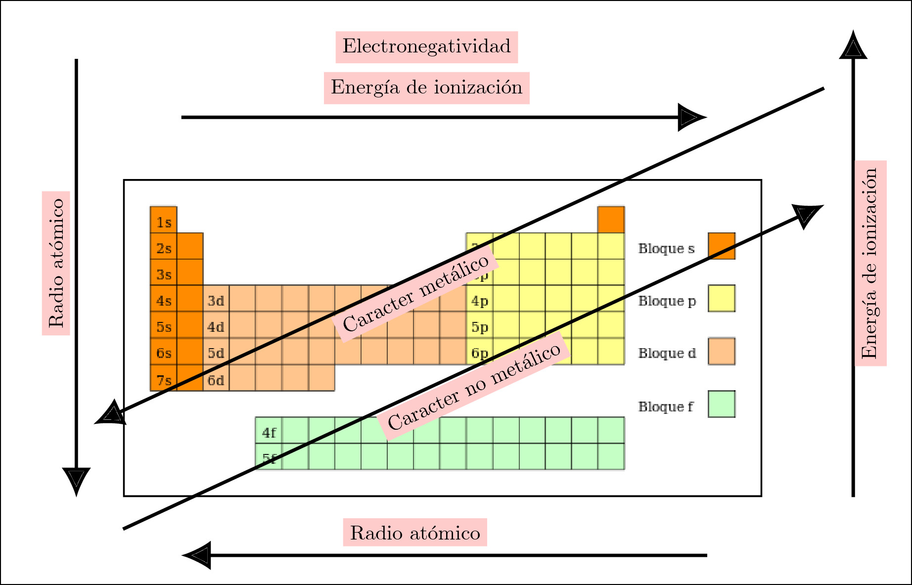 Propiedades periódicas